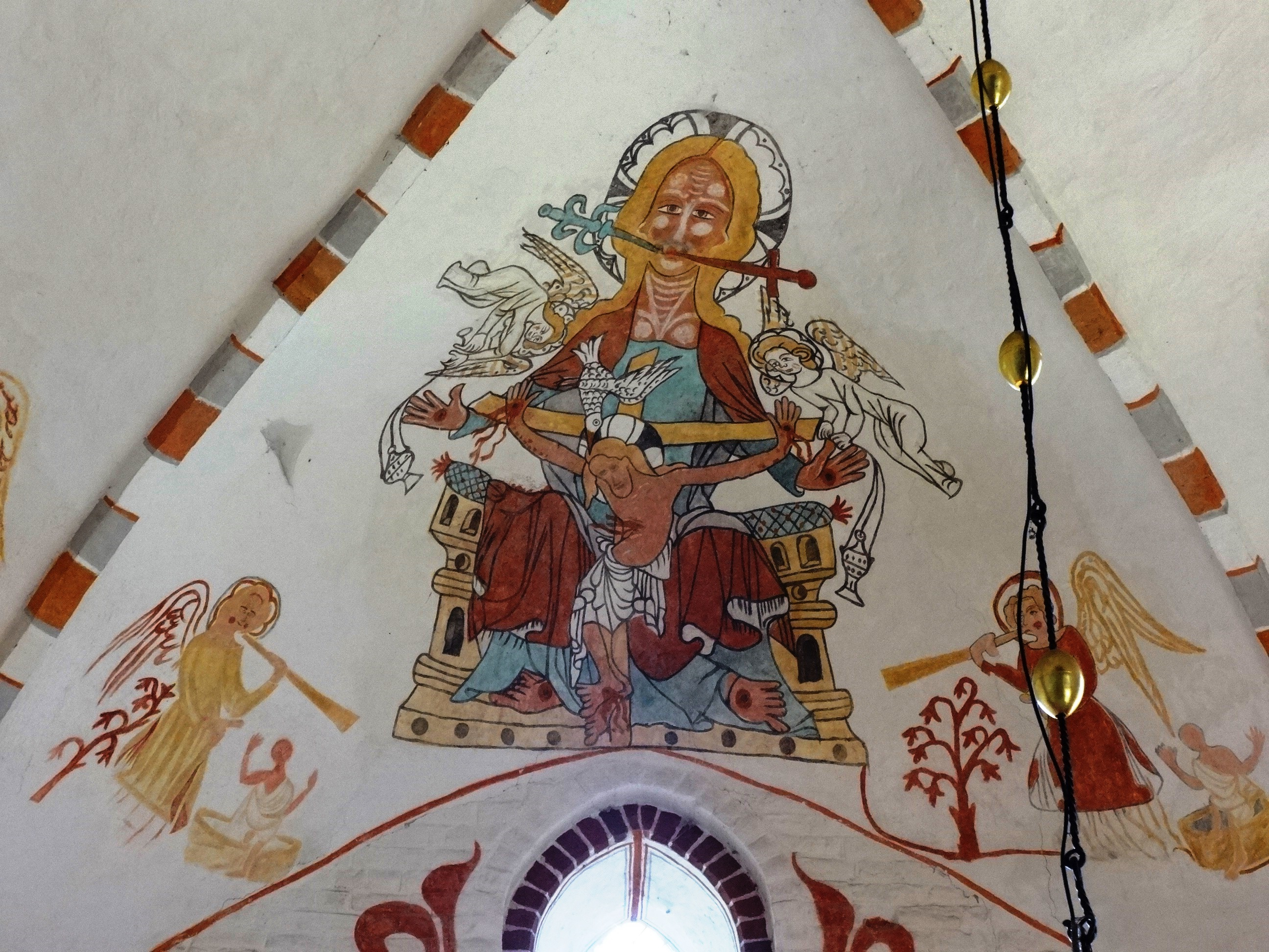 Dorfkirche Reinberg, Backsteinbau aus dem 13. Jahrhundert in der Gemeinde Sundhagen, Vorpommern-Greifswald, Mecklenburg-Vorpommern